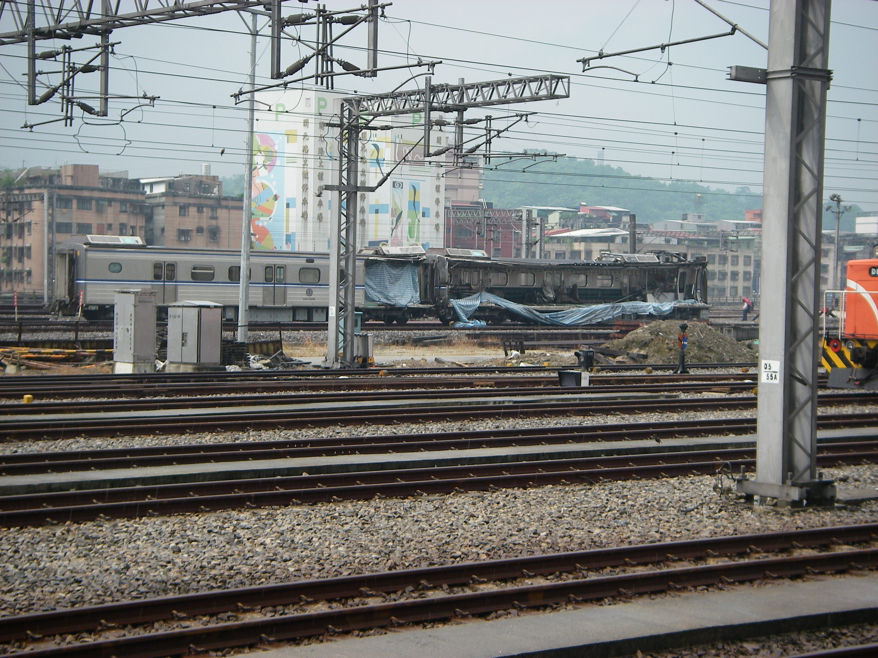 中文（台灣）: 2007年6月15日大里事故中毀損的ET508(左)與EP508(右)，於事故二個月後迴送至七堵調車場放置。